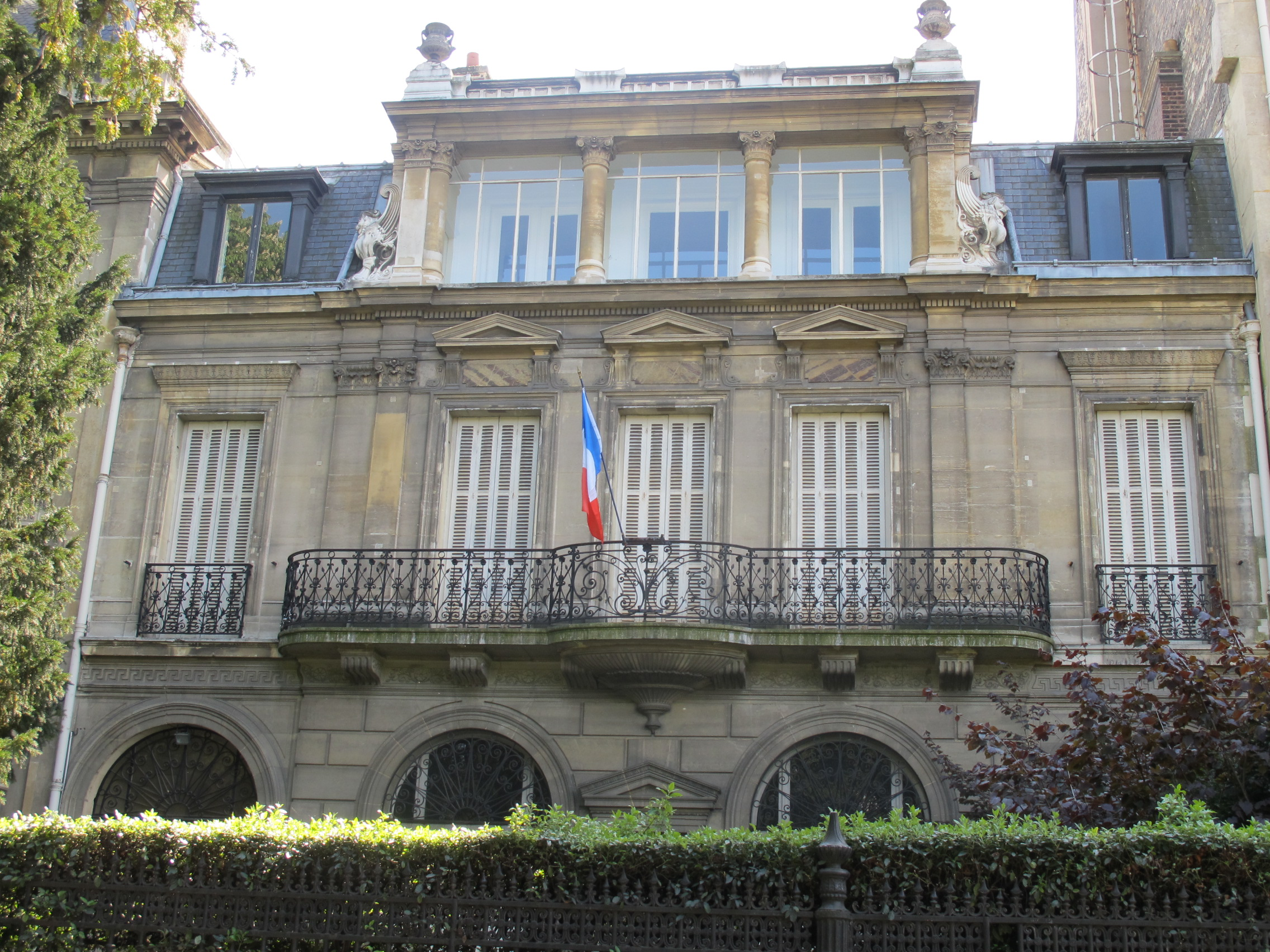 Musée d'Ennery, Paris